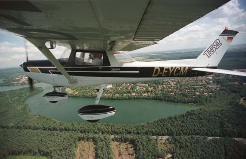 Cessna 152 der Flugschule Pegasus auf einem Rundflug in die nähere Umgebung des Flugplatzes Strausberg.